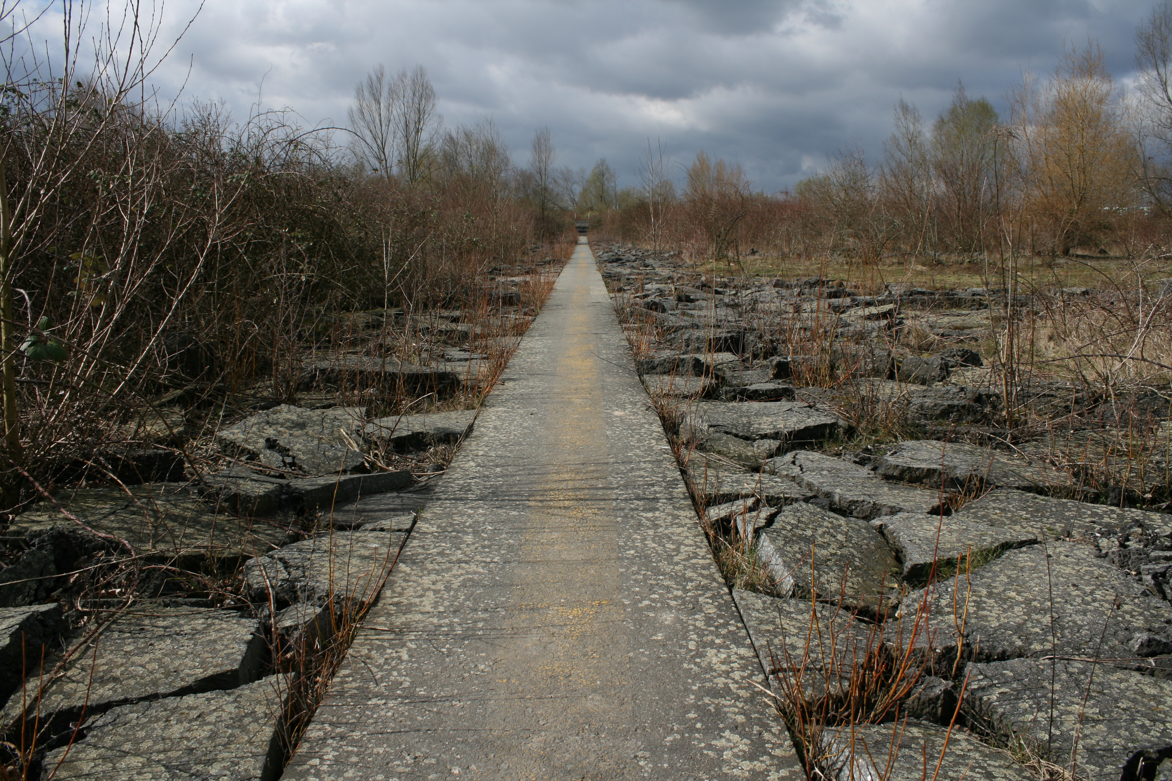 Hubschrauberabstellplätze am Alten Flugplatz im Frankfurter Grüngürtel